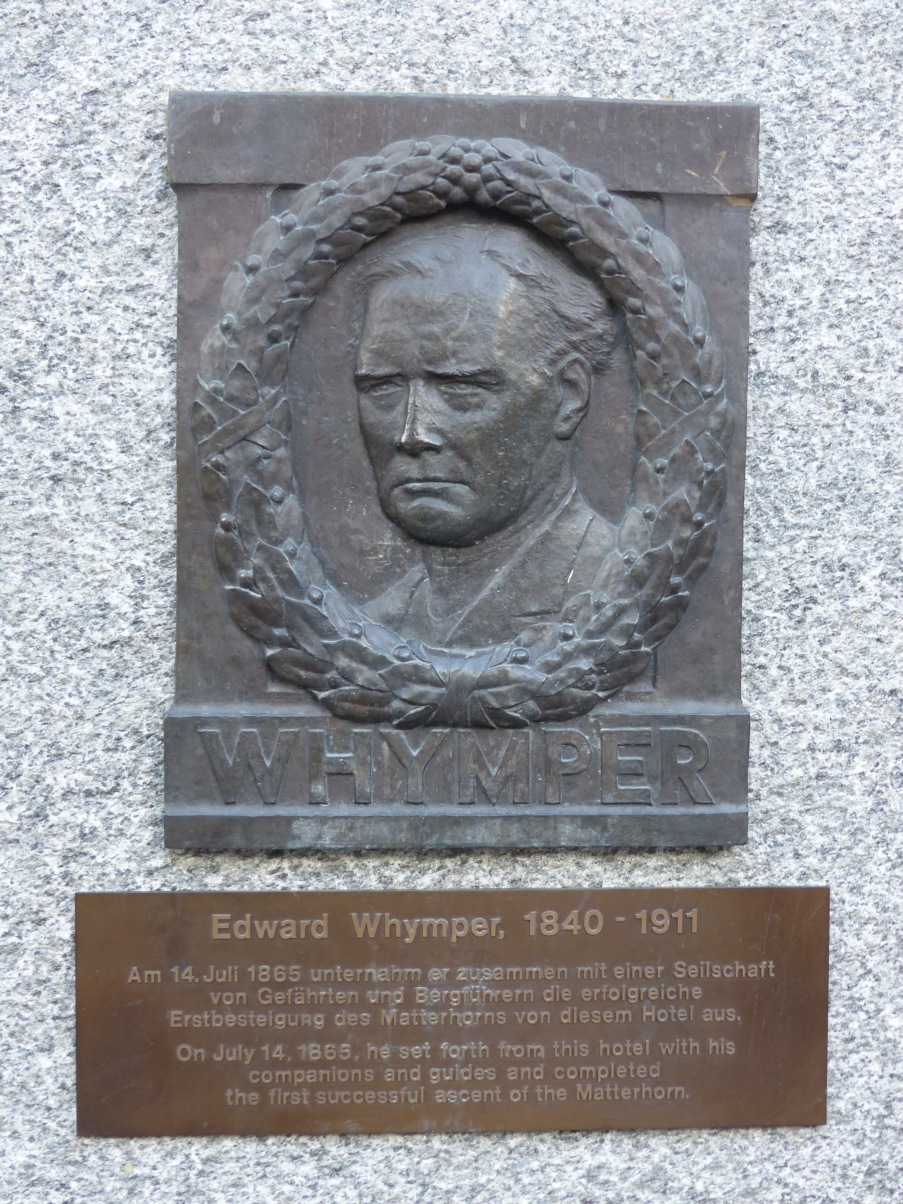 Gedenktafel für Edward Whymper am Hotel Monte Rosa, Zermatt: "Edward Whymper, 1840-1911 Am 14. Juli 1865 unternahm er zusammen mit einer Seilschaft von Gefährten und Bergführern die erfolgreiche Erstbesteigung es Matterhorns von diesem Hotel aus. On July 14, 1865, he set forth from this hotel with his companions and guides and completed the first successful ascent of the Matterhorn."